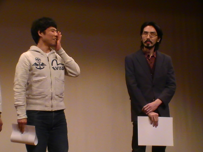 馬鹿よ貴方は (2017年1月)